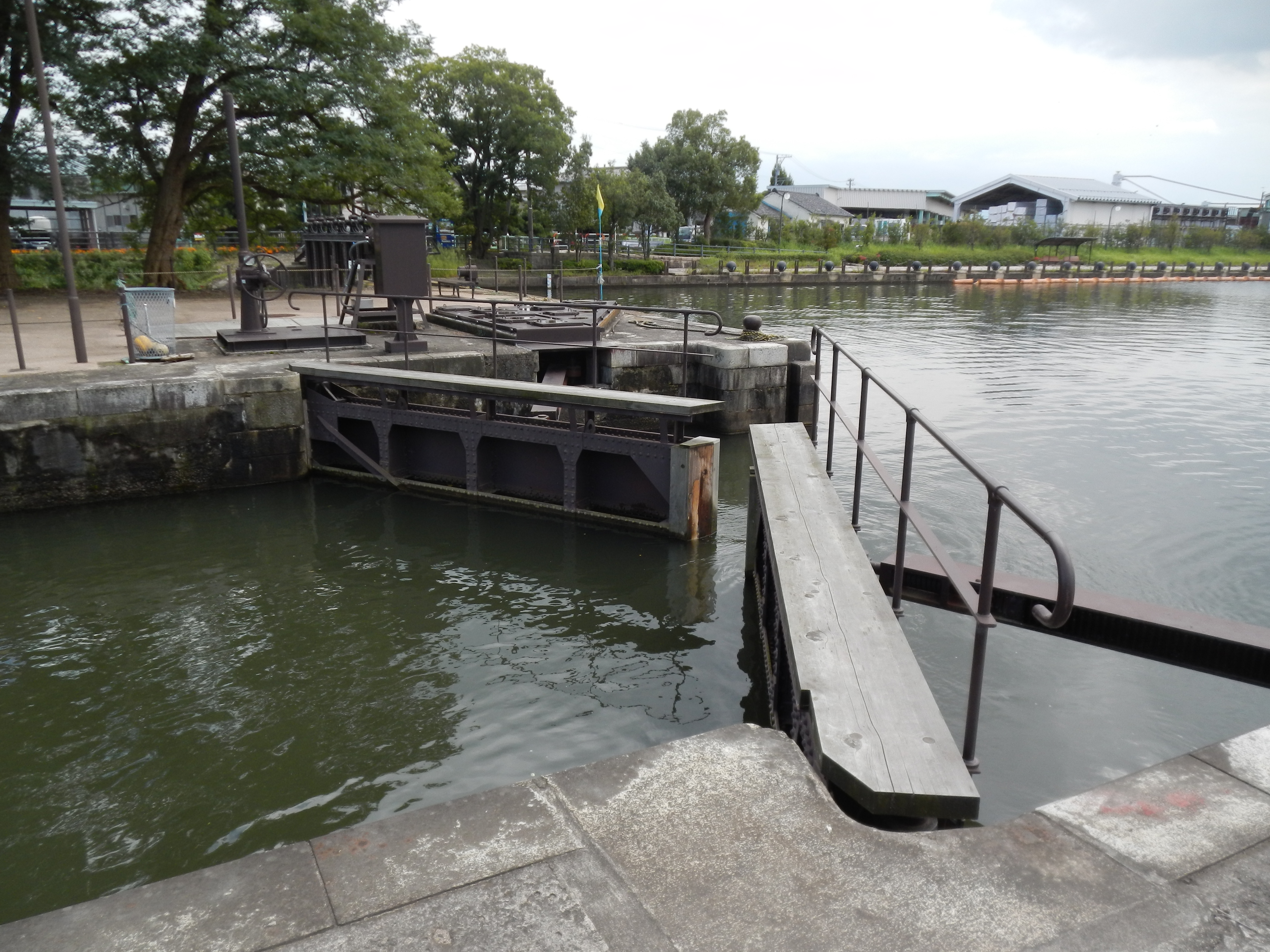 2 Kōjinmachi, Toyama-shi, Toyama-ken 930-0809, Japan